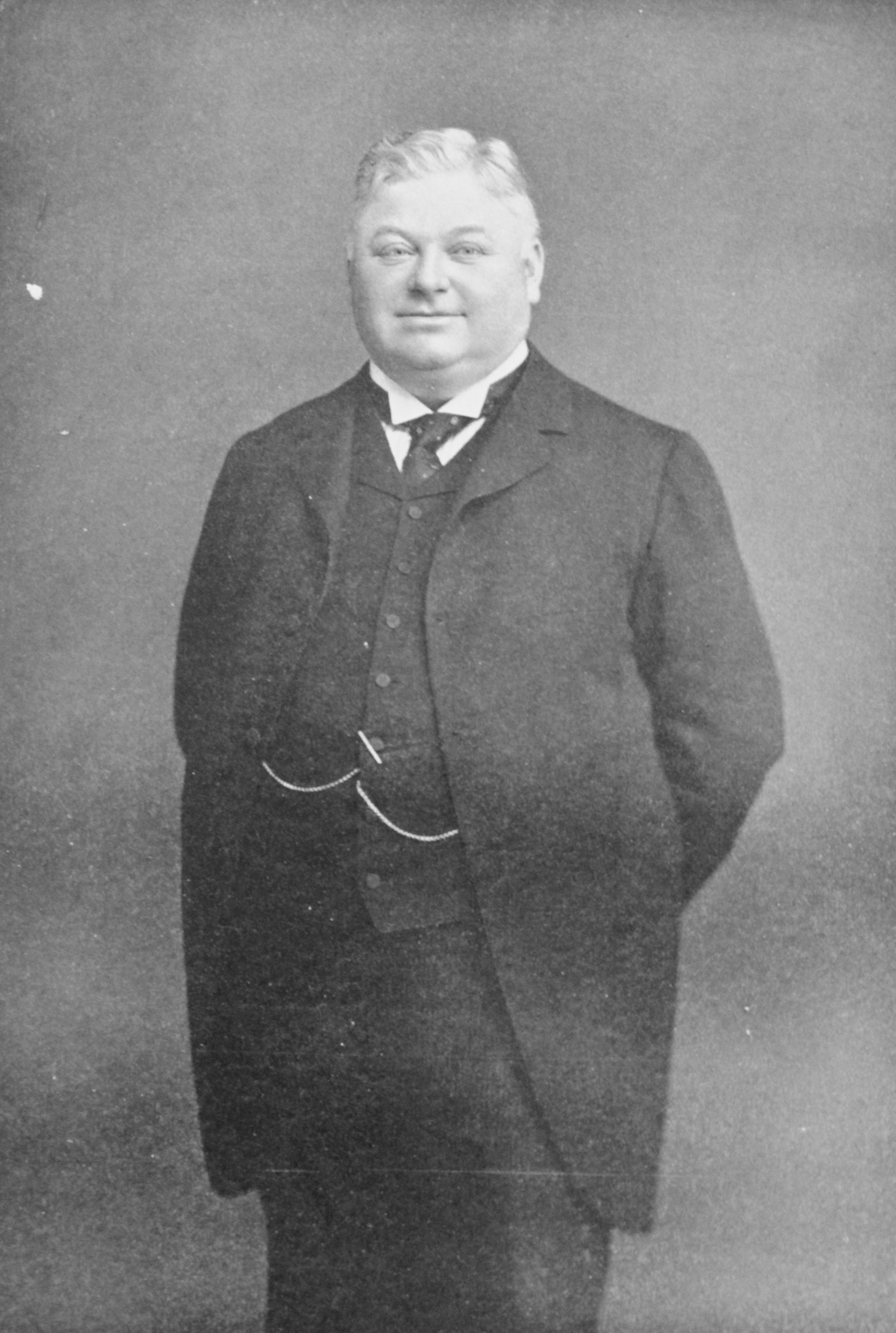 Oscar Bæckström. Från omslaget av tidskriften Scenisk konst nummer 1/1902.